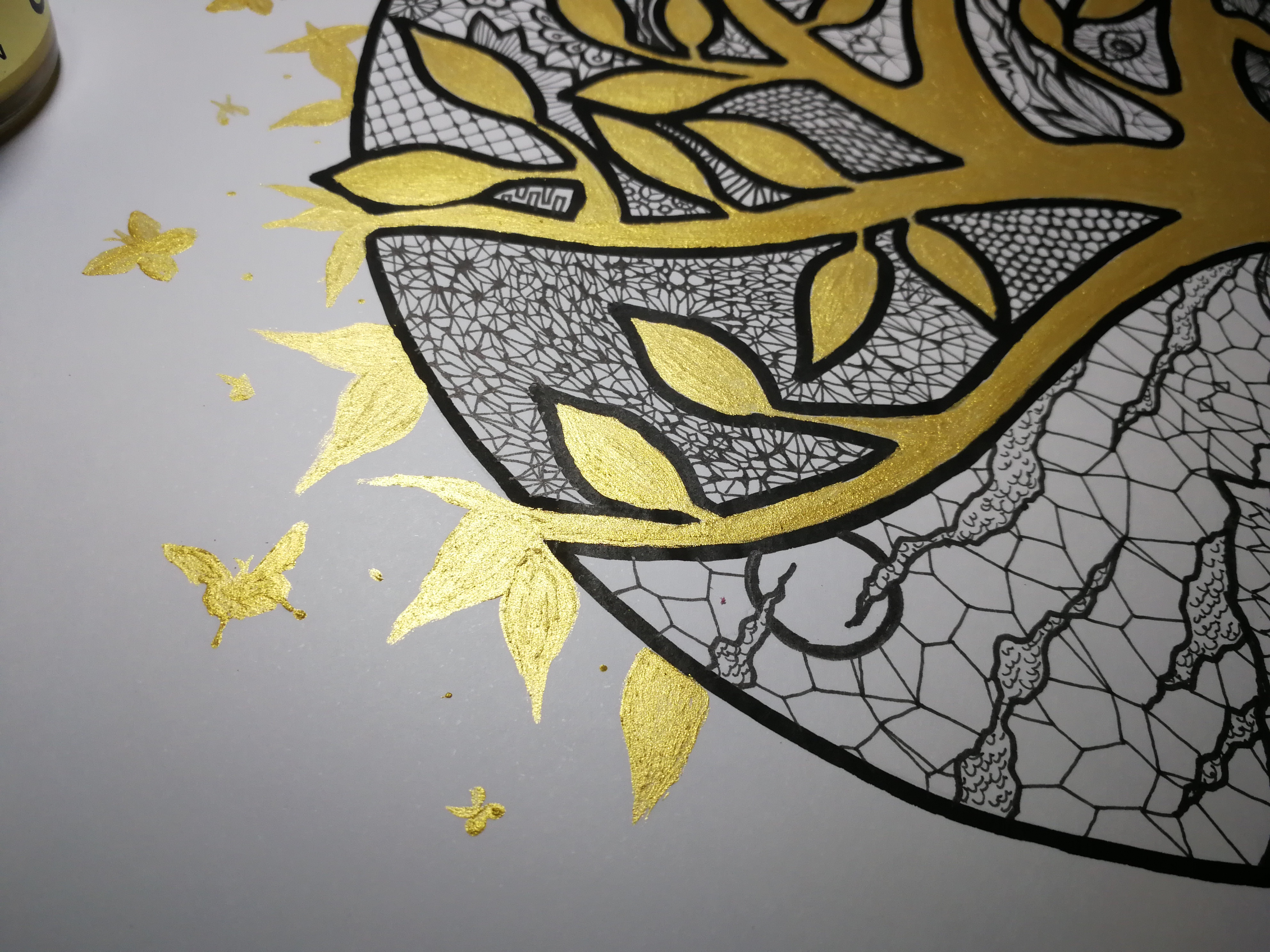 Artiste illustrateur